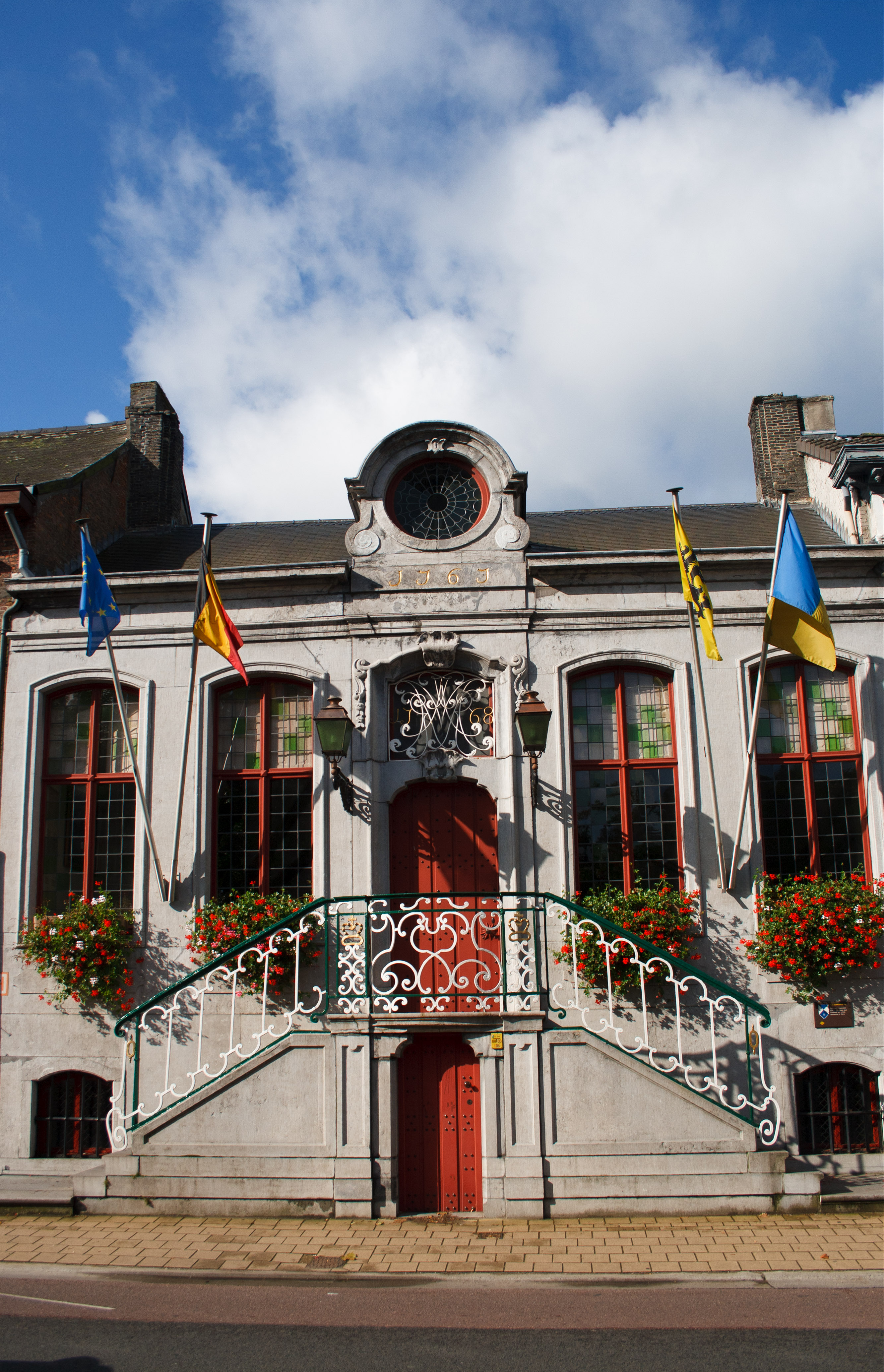 Gemeentehuis 1767 naar een ontwerp van Casteleyn. Nieuwkerken-Waas, België